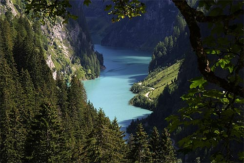 Gigerwaldsee im Calfeisental